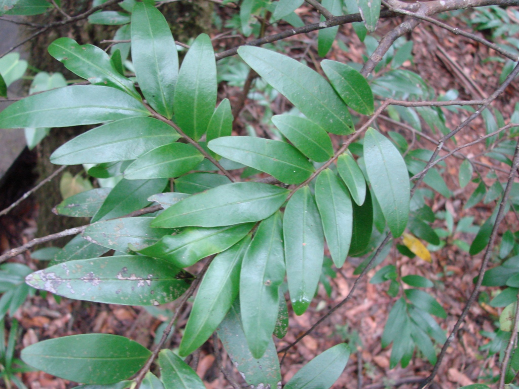 Xylopia emarginata - ANNONACEAE Parque Nacional da Chapada dos Veadeiros - Alto Paraíso de Goiás - Goiás - Brasil.